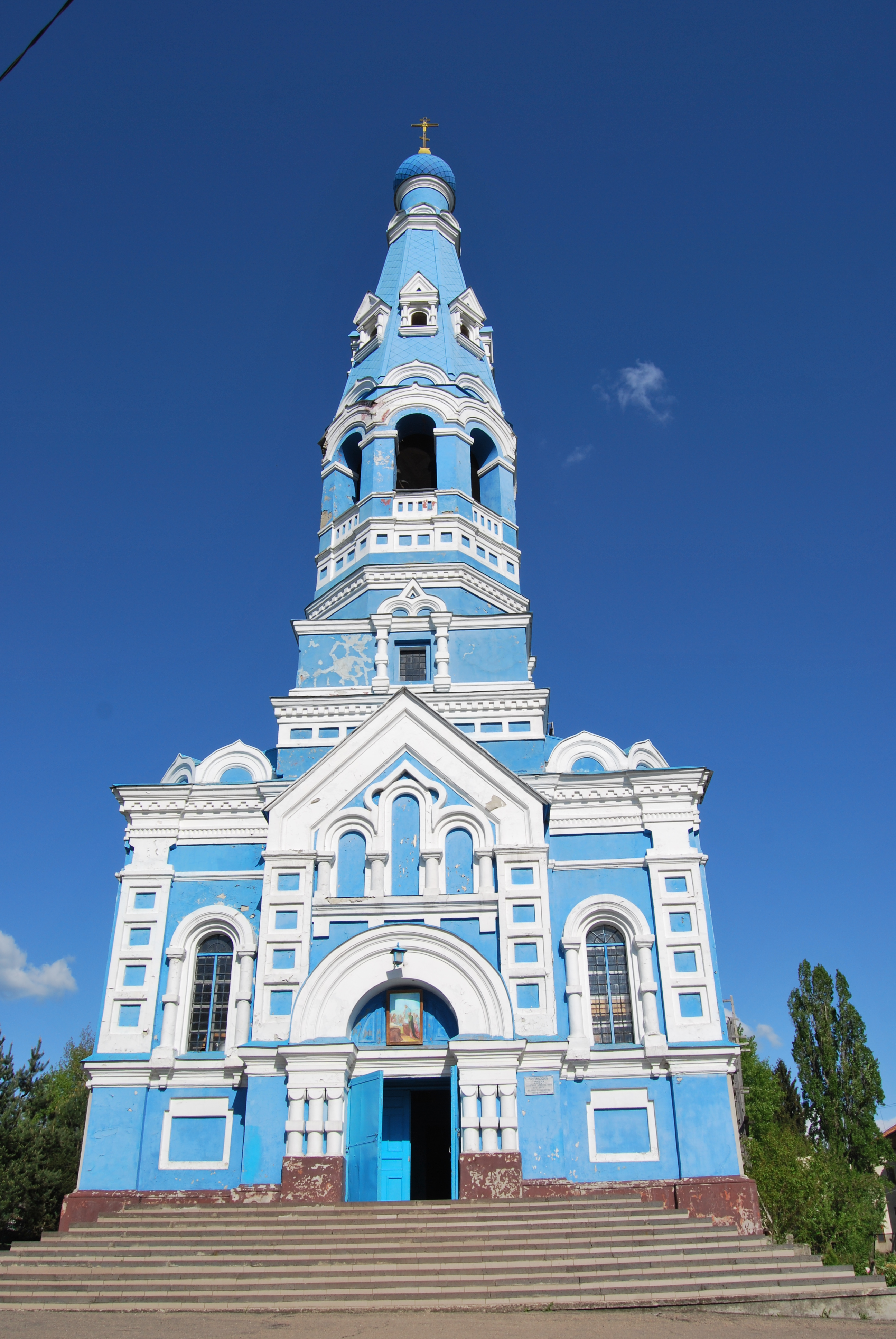 Успенський собор, Балта, вул. Ломоносова, 28